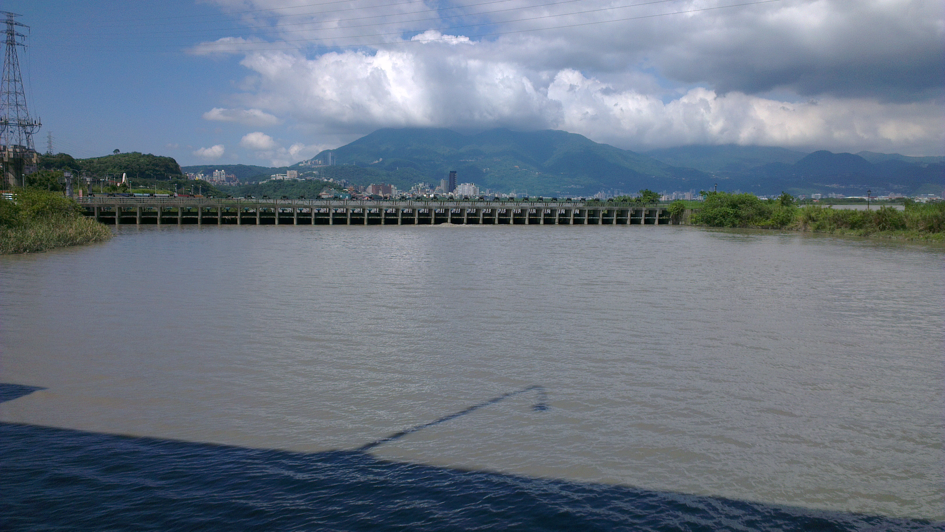 中文（台灣）: 溫子圳閘門位置在二重疏洪道五股端